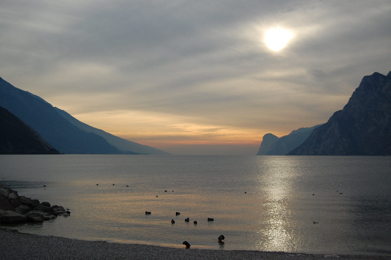 il Lago di Garda visto da Torbole un pomeriggio d'inverno